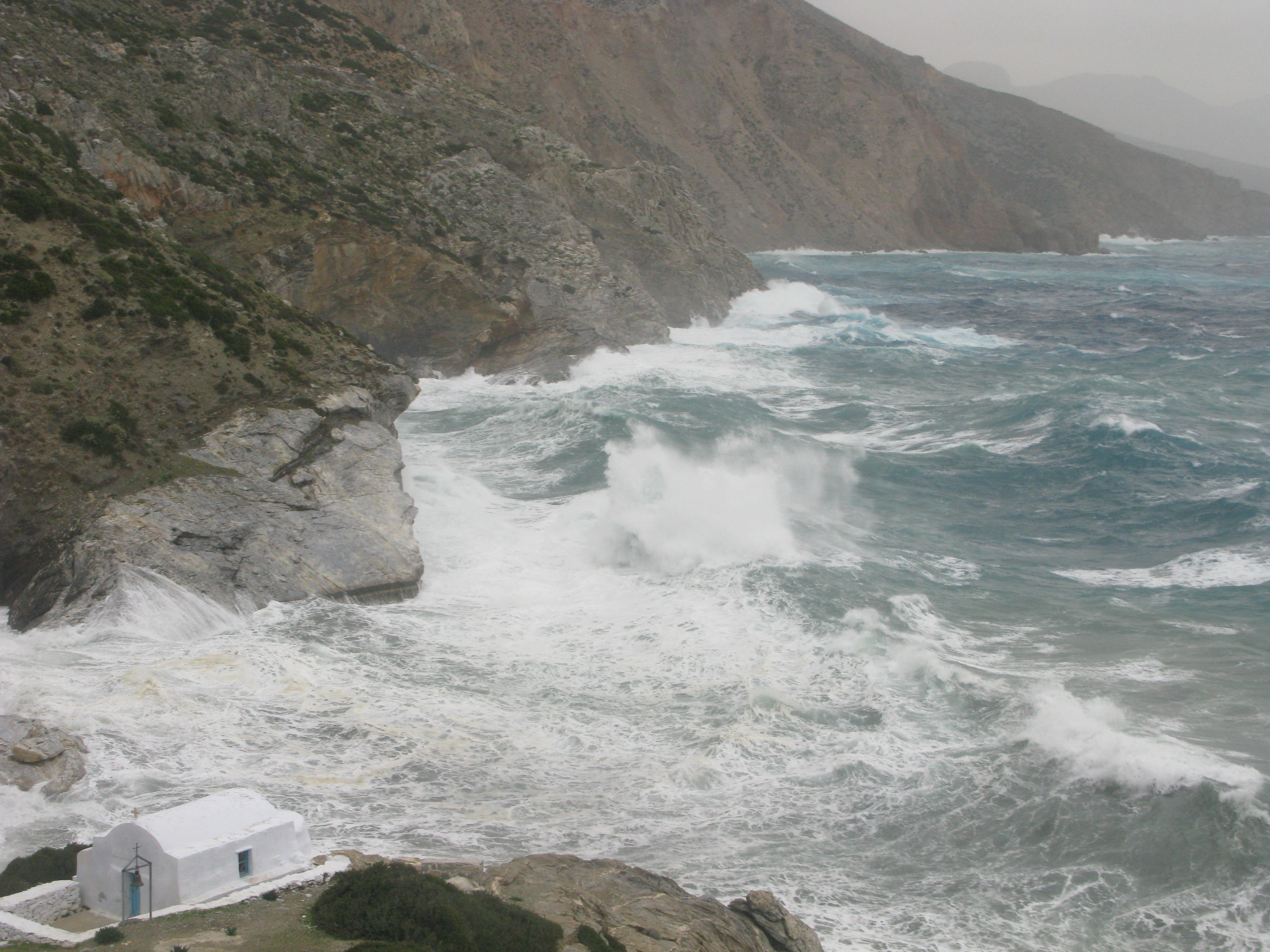 Φουρτούνα στην Αμοργό